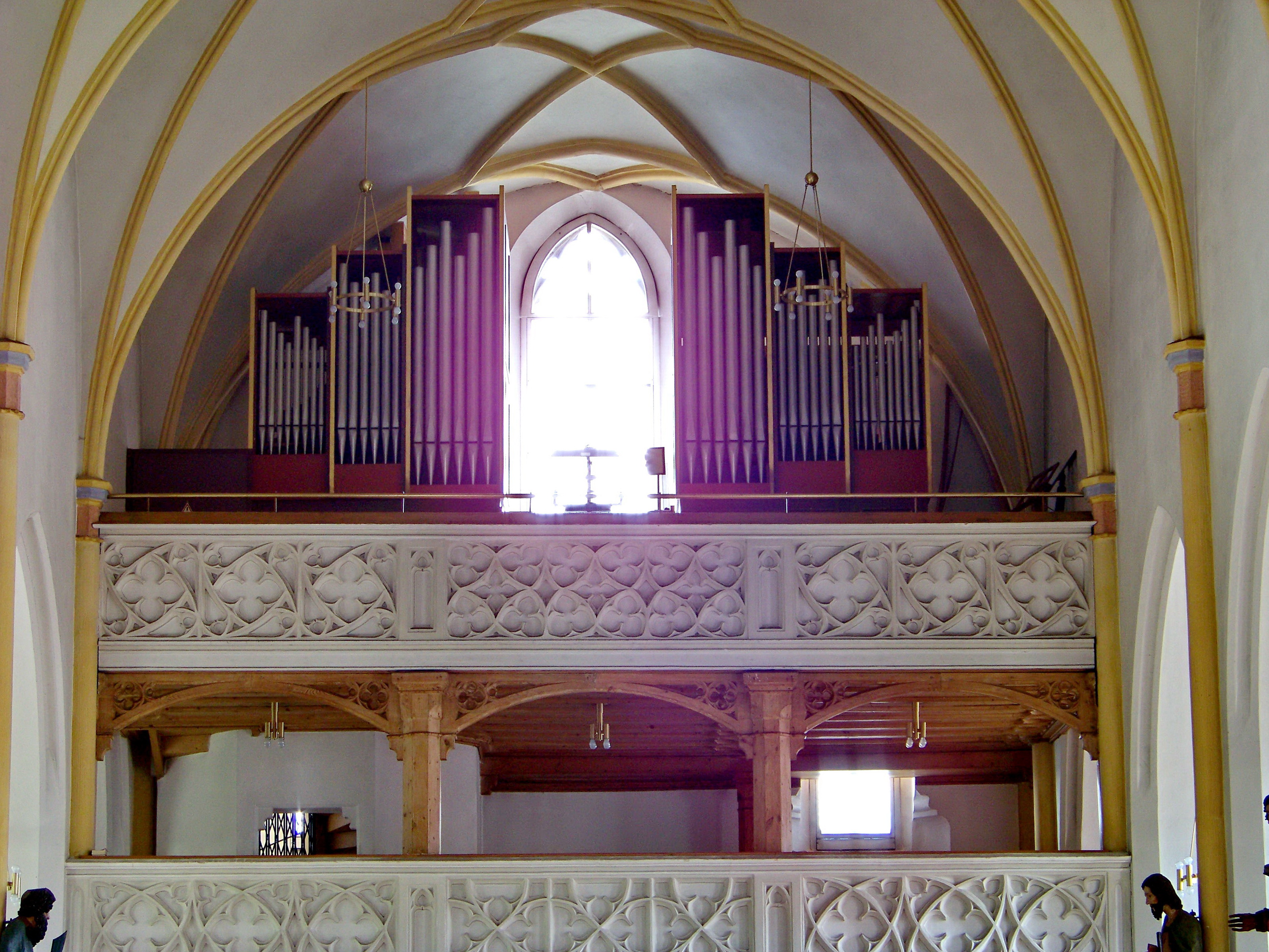 Rottenburg Kirchstraße 5. Katholische Pfarrkirche St. Georg. Staffelhalle mit eingezogenem Chor, neugotischer Blankziegelbau, von Leonhard Schmidtner 1868/69, Gliederung durch Strebepfeiler. Nenninger Orgel auf der Westempore.